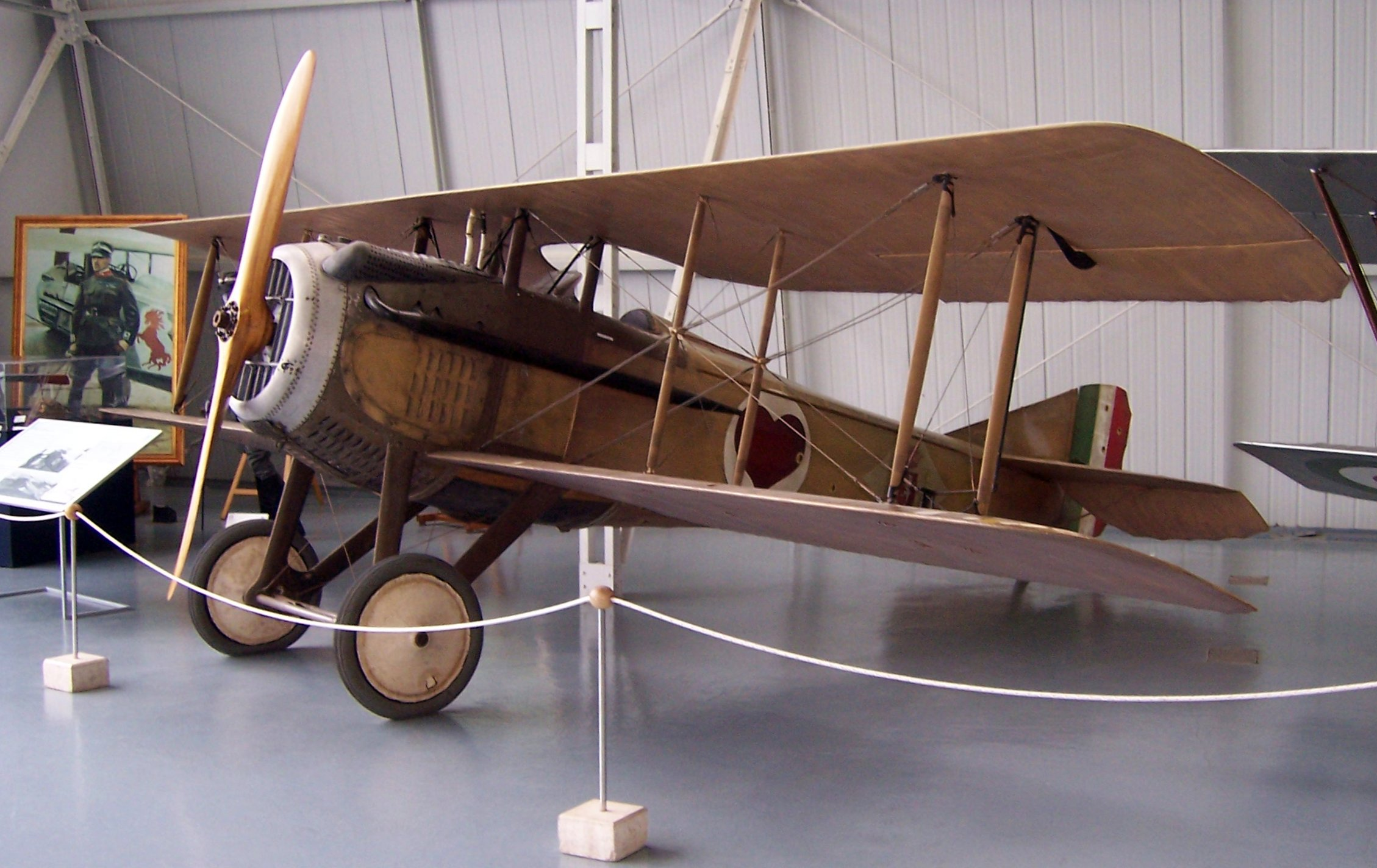 SPAD SVII des italienischen Piloten Ernesto Cabruna im Museo storico dell'Aeronautica Militare di Vigna di Valle